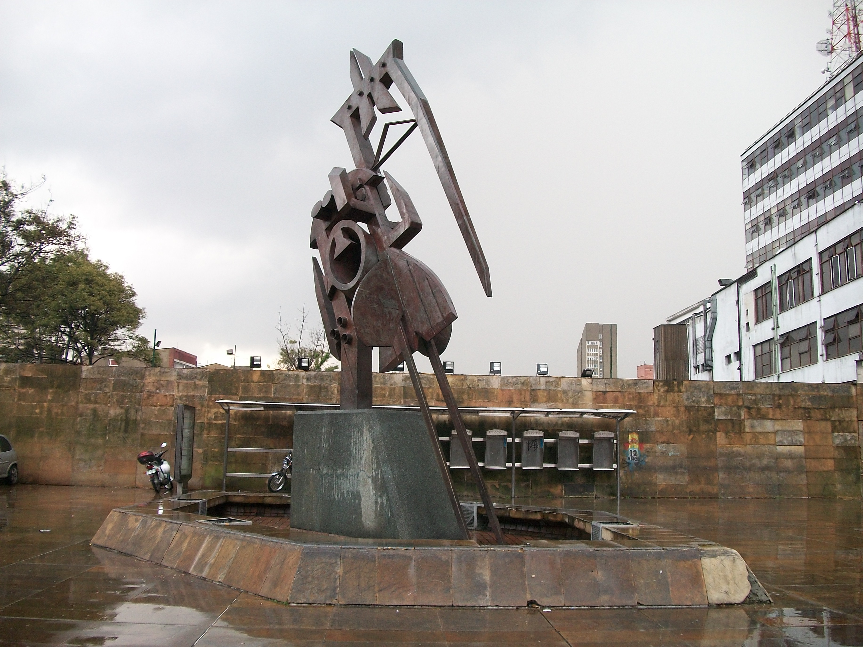 "Soltando la Onda", Bogotá, carrera 13 con 23. Edificio de Telecom. Obra de Alejandro Obregón. Pasada a bronce por el escultor Gerardo Benítez Bolaños.